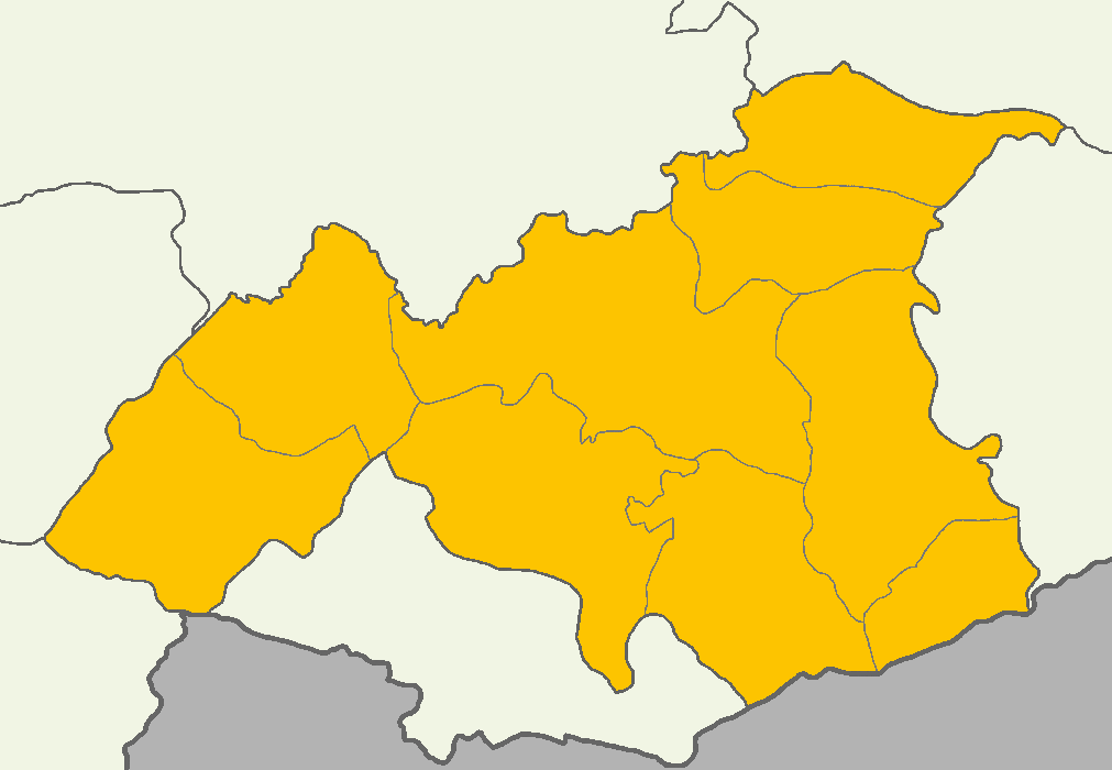 Gaziantep'te 2014 Türkiye cumhurbaşkanlığı seçimi